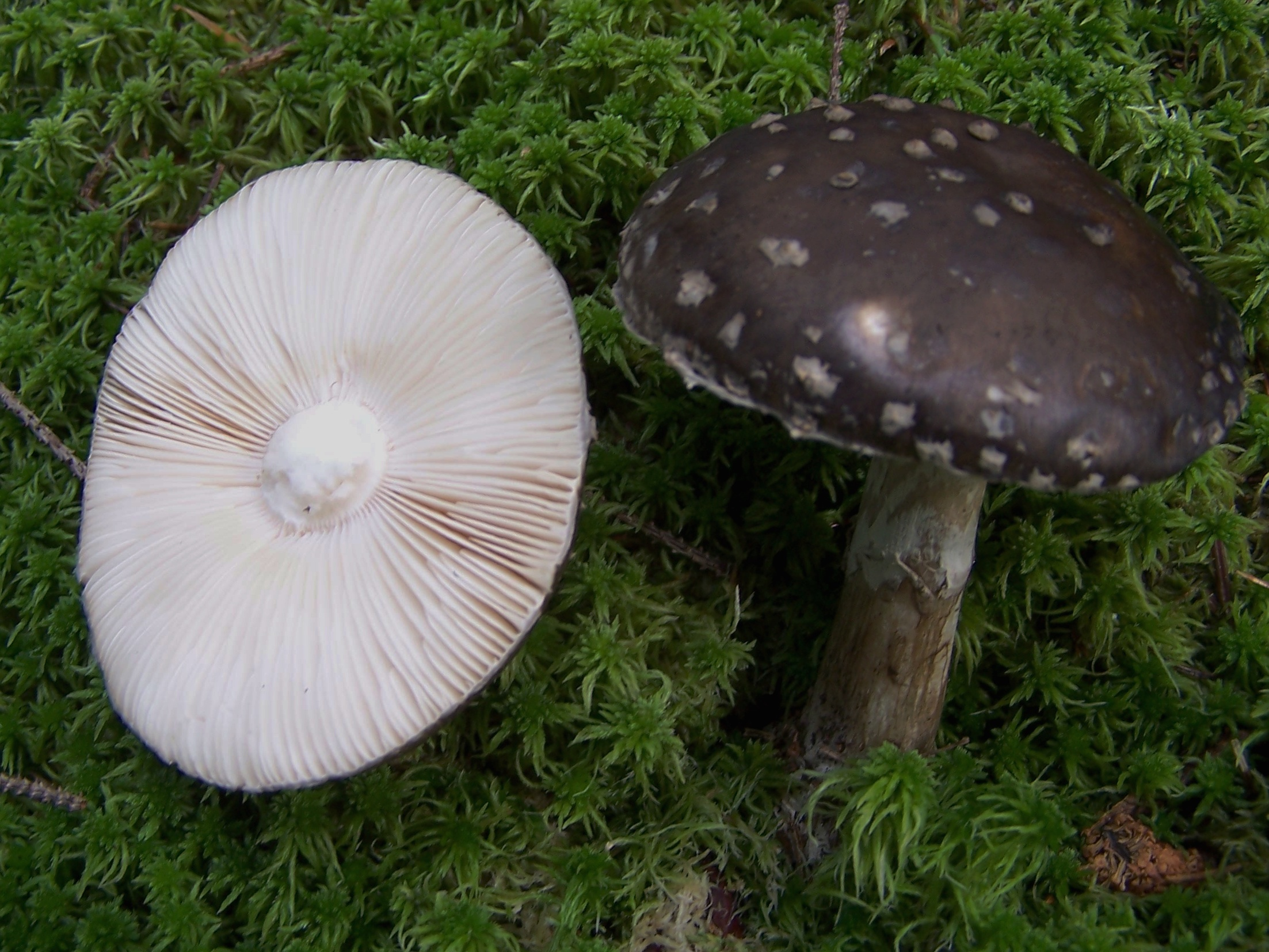 Amanita porphyria